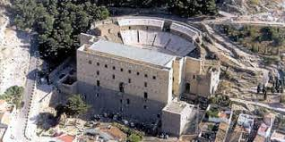 entorno teartro